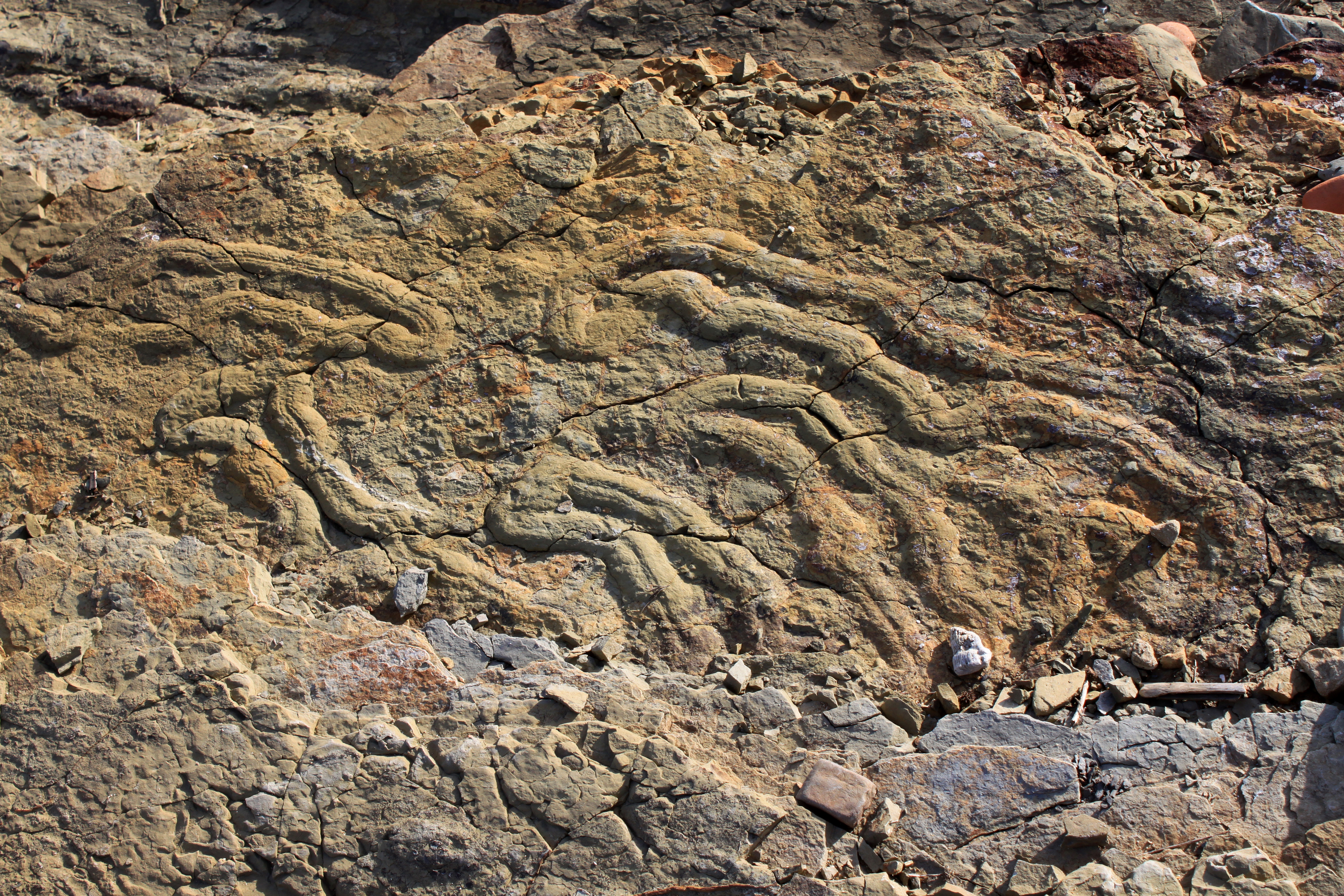 Icnofósil Subphyllochorda en arenisca de los flyschs de punta de San García. Complejos del Campo de Gibraltar, Unidad de Algeciras (Oligoceno-Mioceno). Algeciras, Andalucía, España.